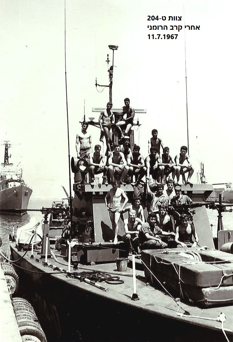 צוות הטרפדת ט-204 לאחר קרב הרומני